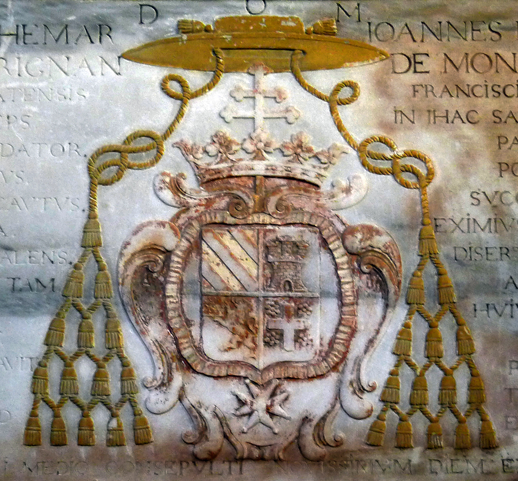 Armes de la famille des archevêques d'Arles du XVIIe siècle, François et Jean-Baptiste Adhémar de Monteil de Grignan (chapelle Saint-Genest, église Saint-Trophime d'Arles)